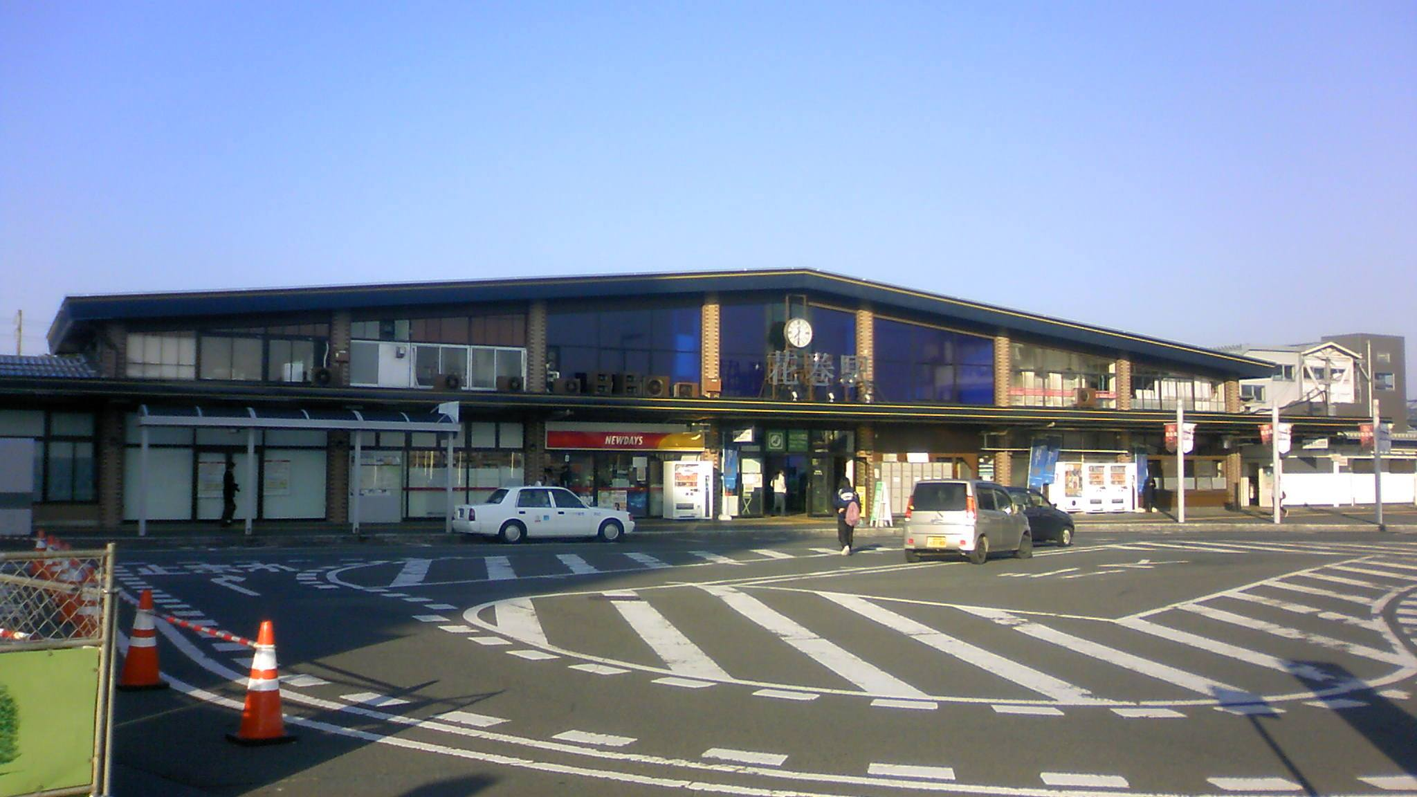 JR東日本 花巻駅駅舎